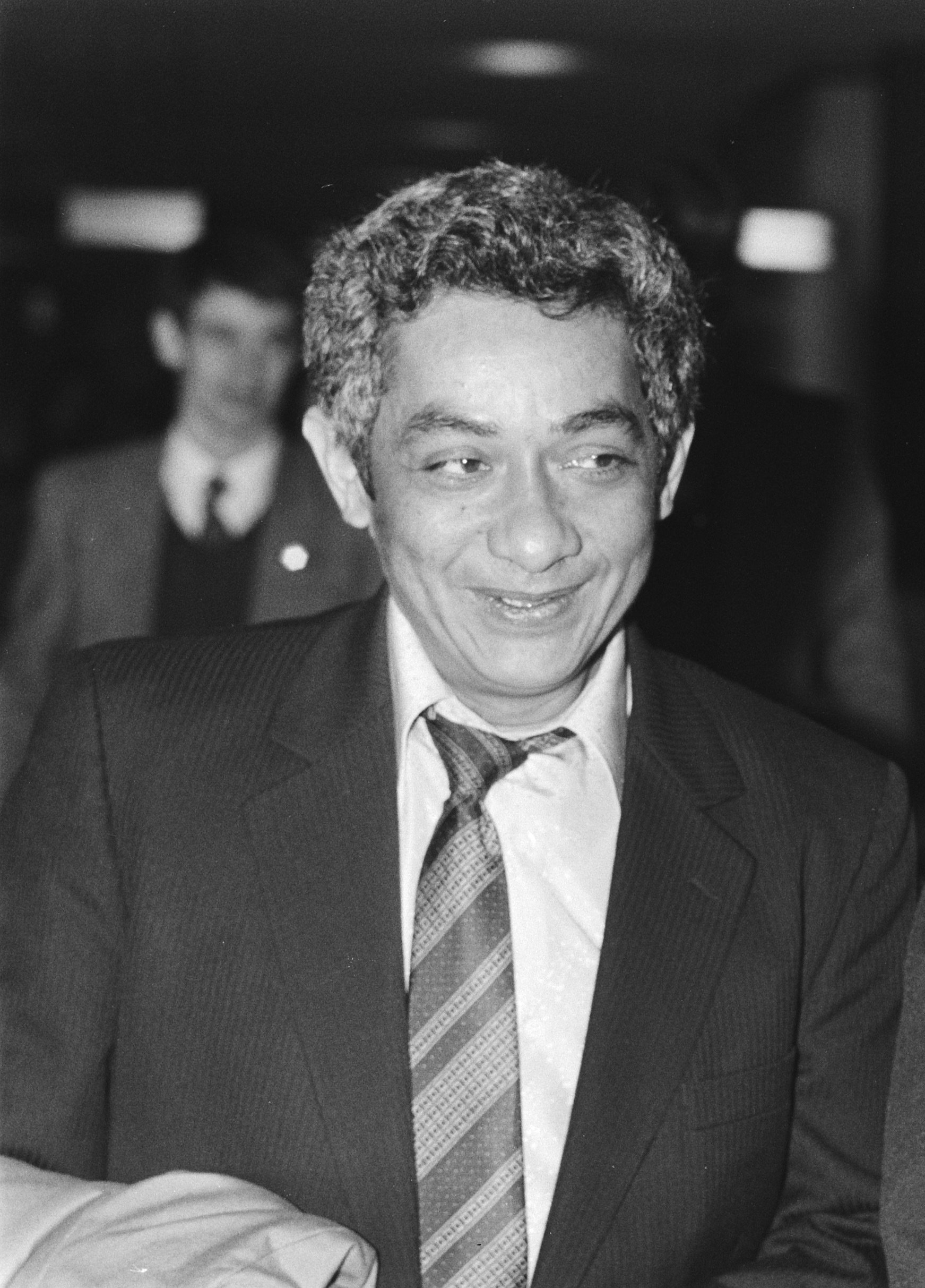 Henk Chin A Sen (voorzitter van de Raad voor de Bevrijding van Suriname) wordt bij aankomst op Schiphol afgehaald door vice-voorz. ir. Sewradsingh